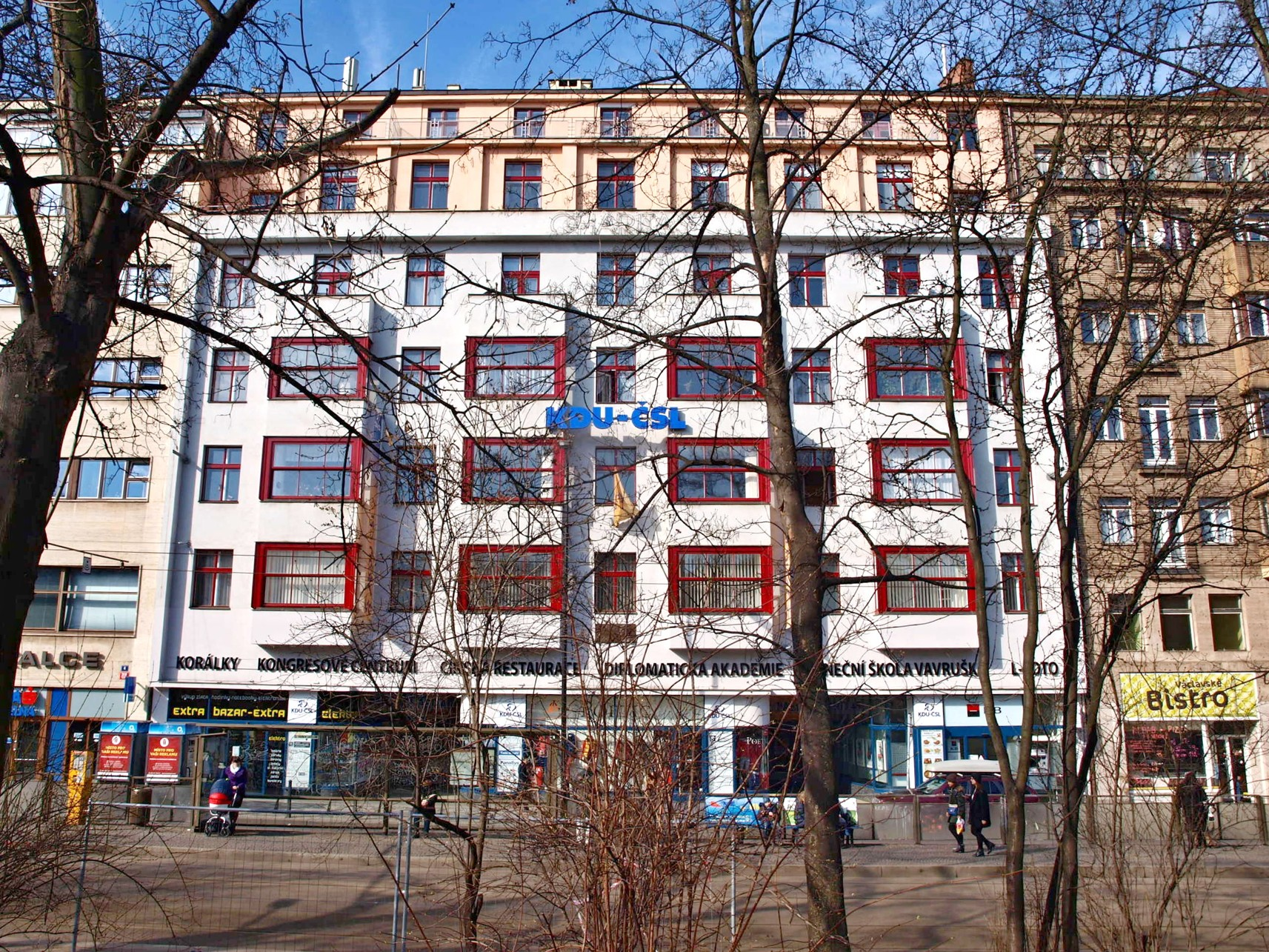 Karlovo náměstí